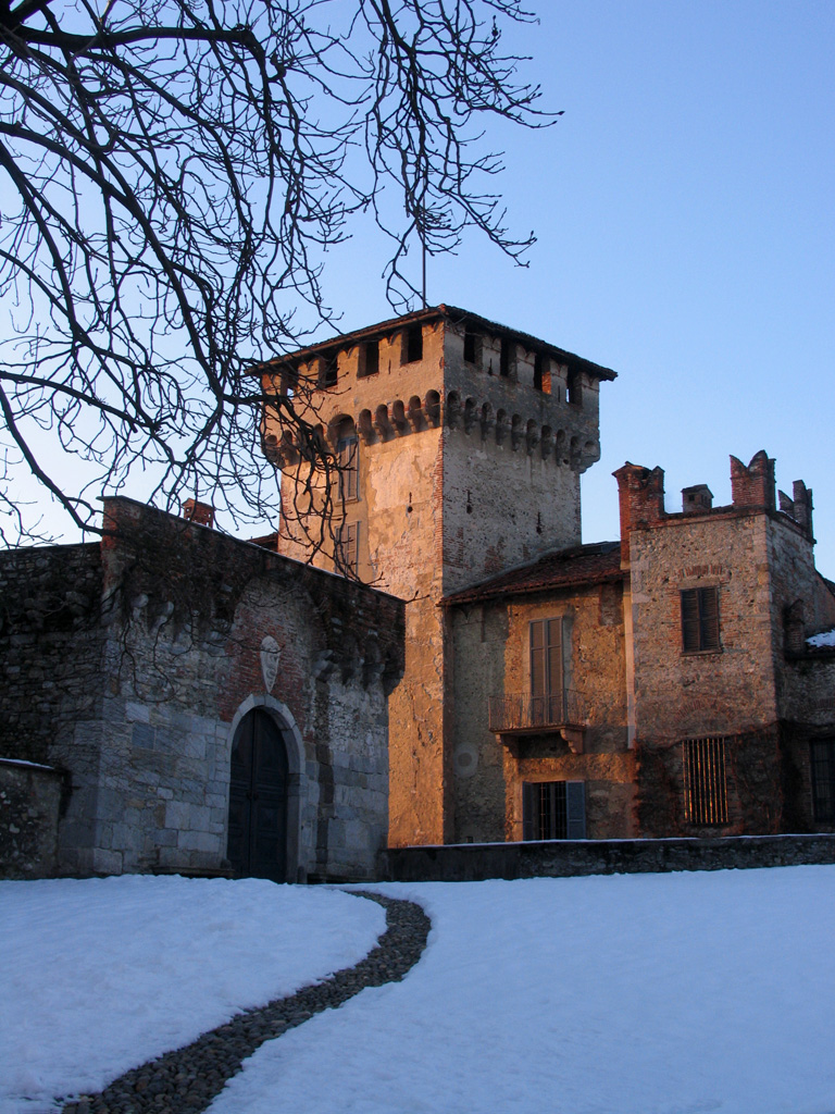 Castello - Somma Lombardo 01/2009